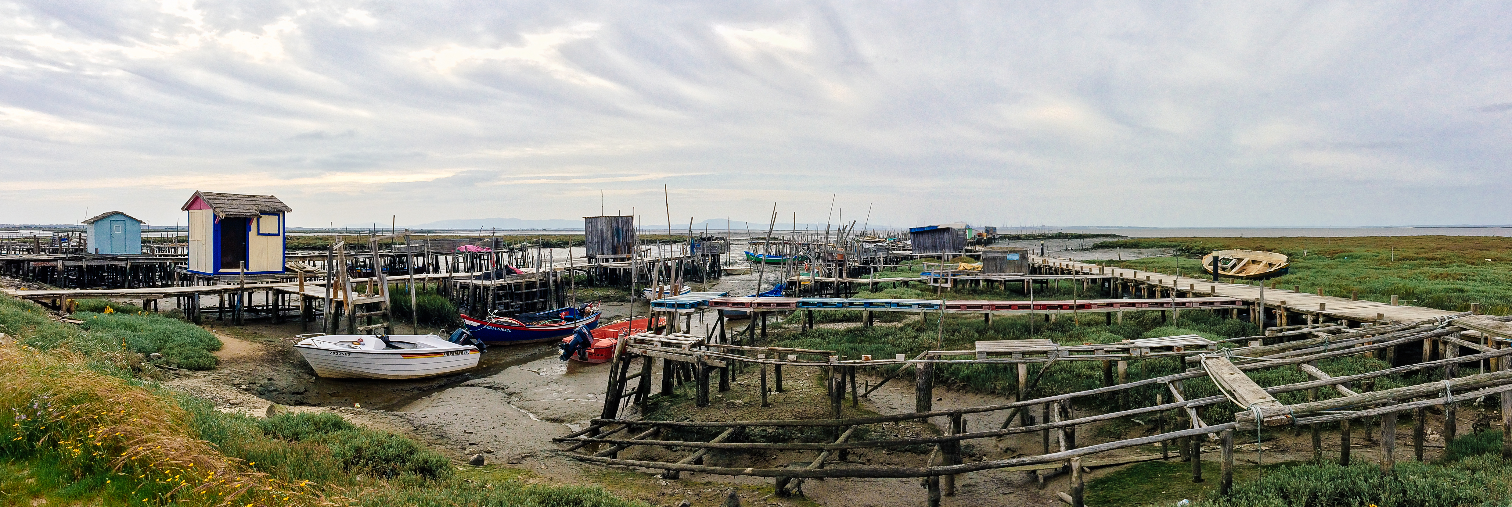 Panorâmica do local, inserido na Reserva Natural do Estuário do Sado This is a photography of a Site of Community Importance in Portugal with the ID: PTZPE0011. Natura2000 entry, EEA entry